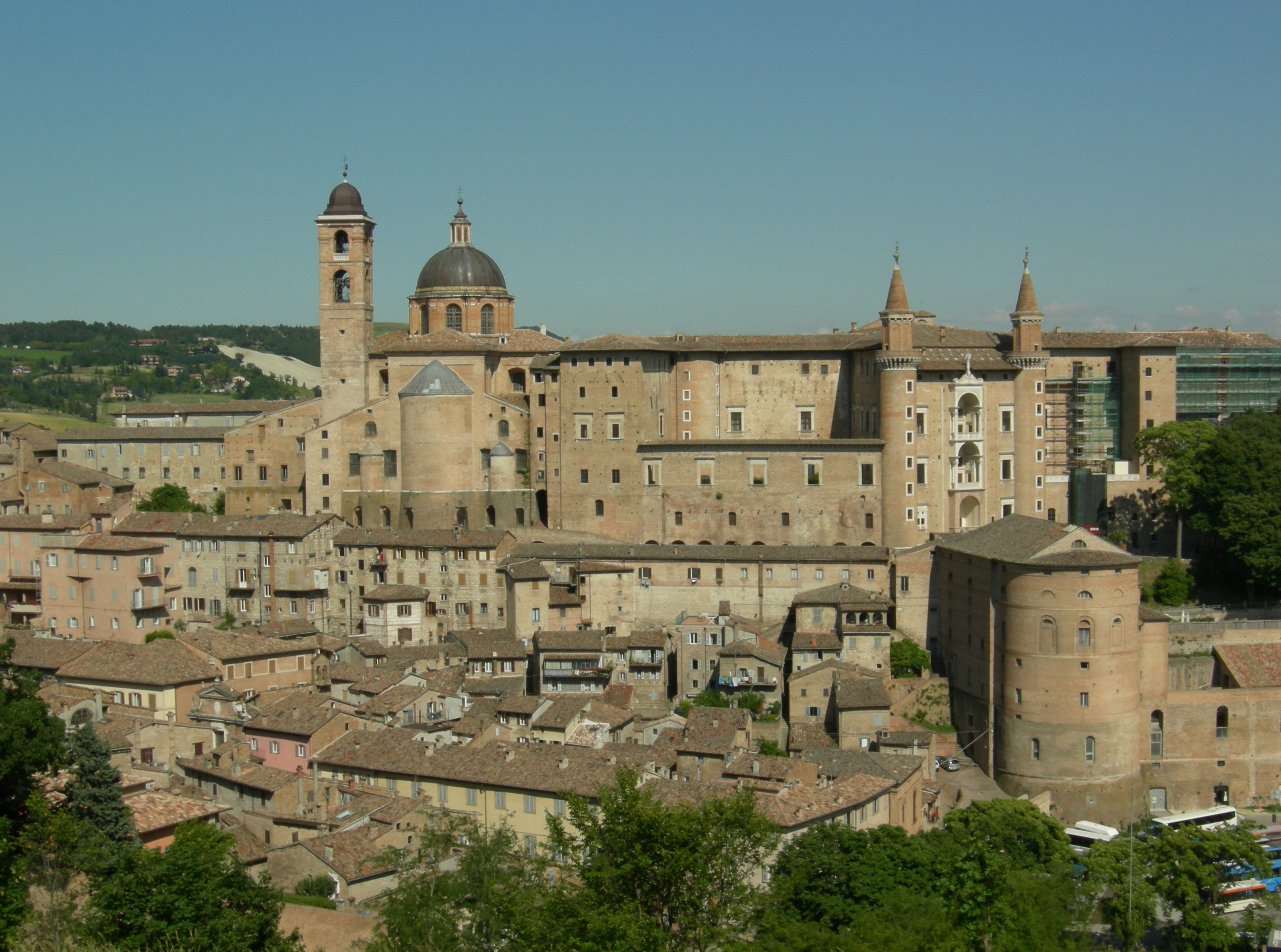 Veduta di Urbino dalla Pineta